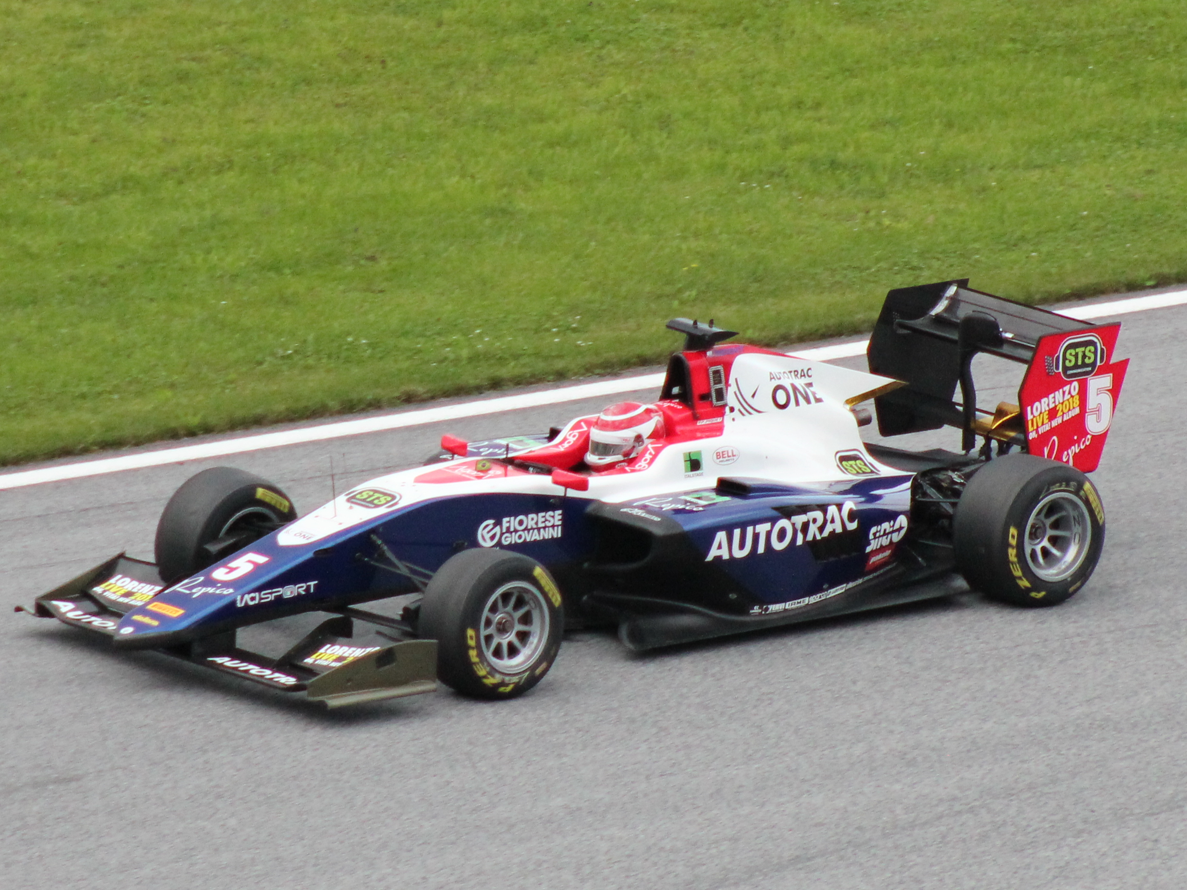 05 Pedro Piquet beim Rennwochenende in Österreich 2018 (3)